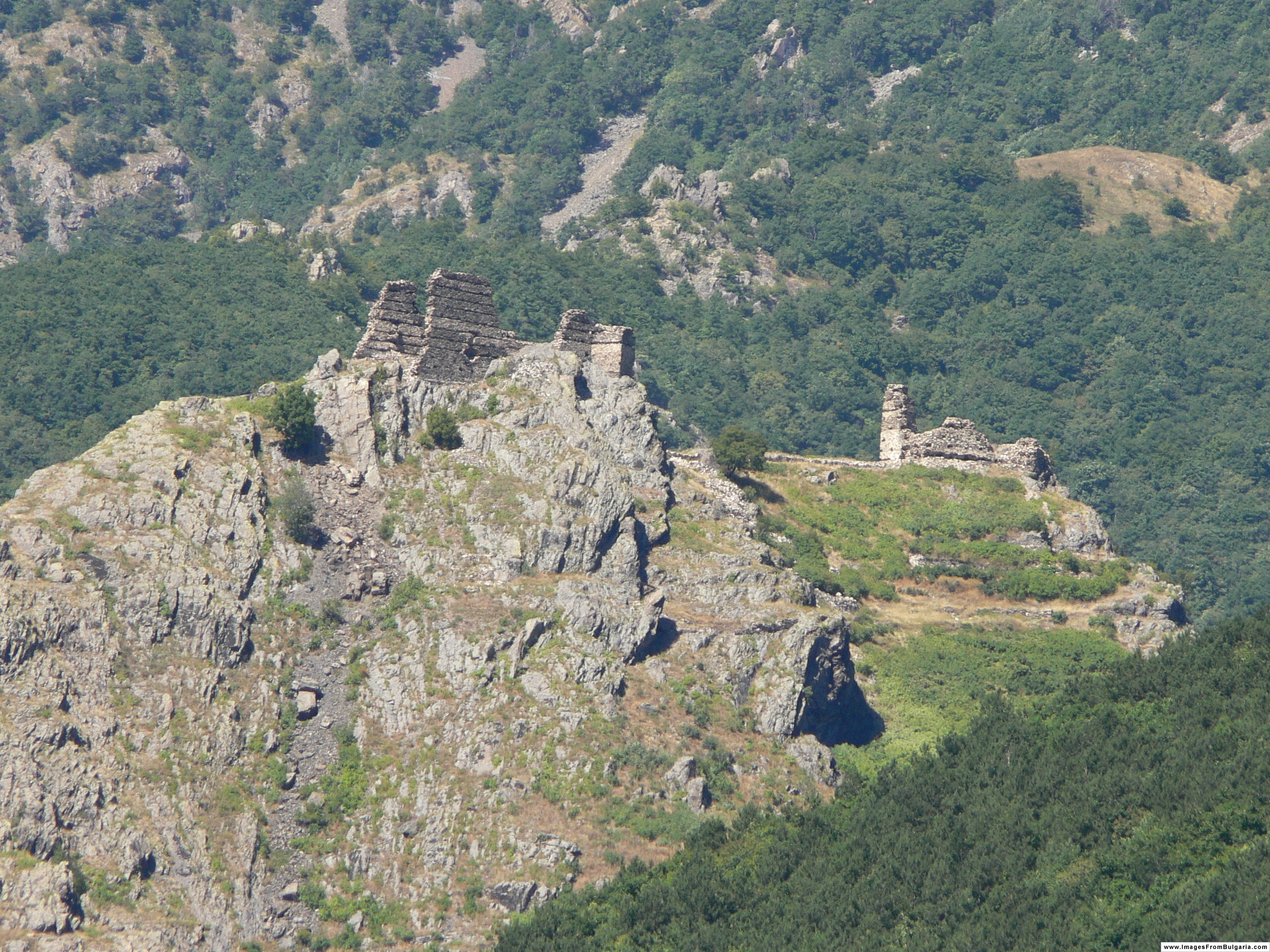 Anevsko Kale, a castle in Bulgaria